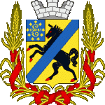 Проект герба Павлограда Кене